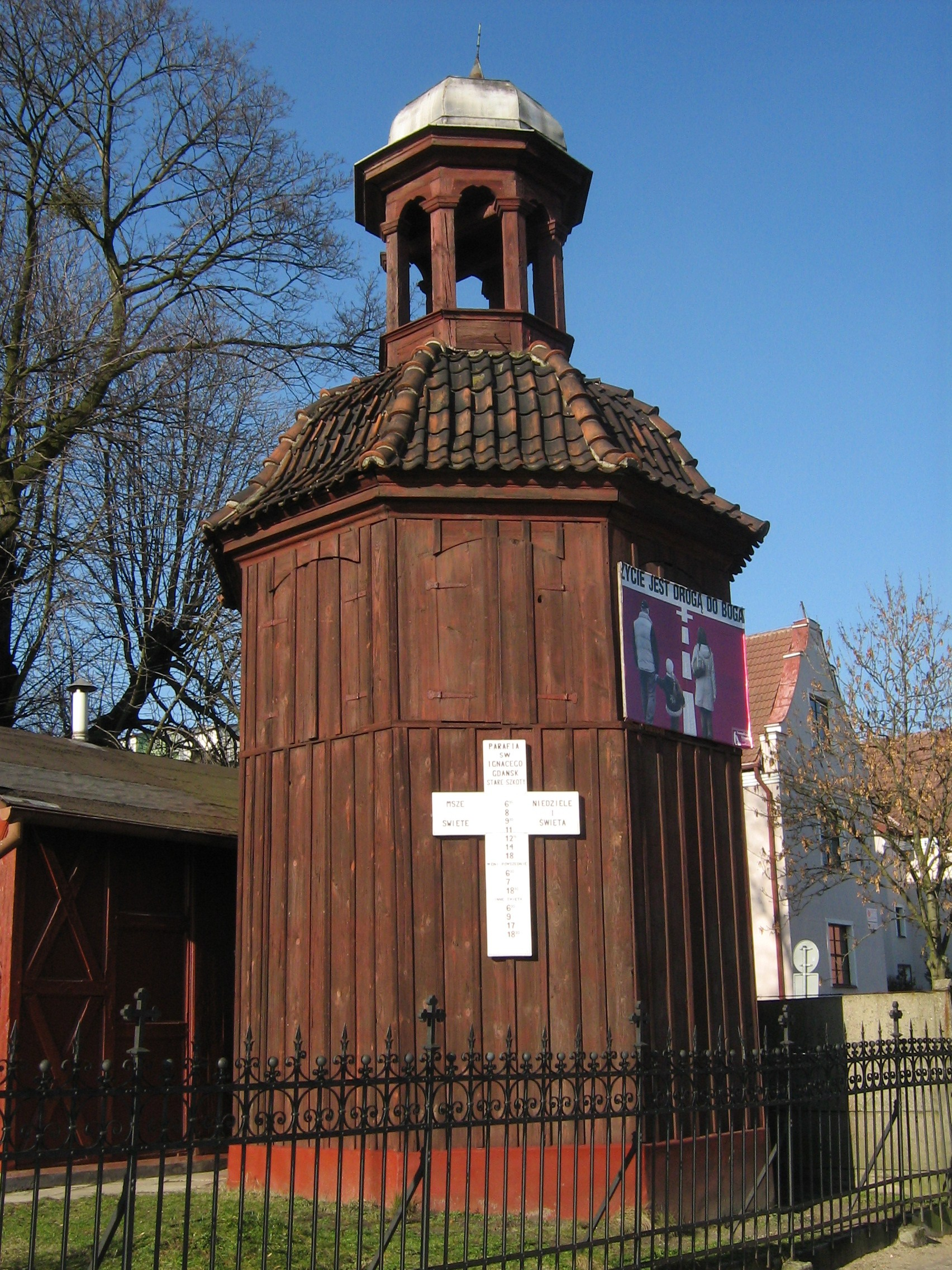 Gdańsk Stare Szkoty, ul. Brzegi 49 - drewniana dzwonnica, 1777 w zespole kościoła parafialnego p.w. św. Ignacego Loyoli